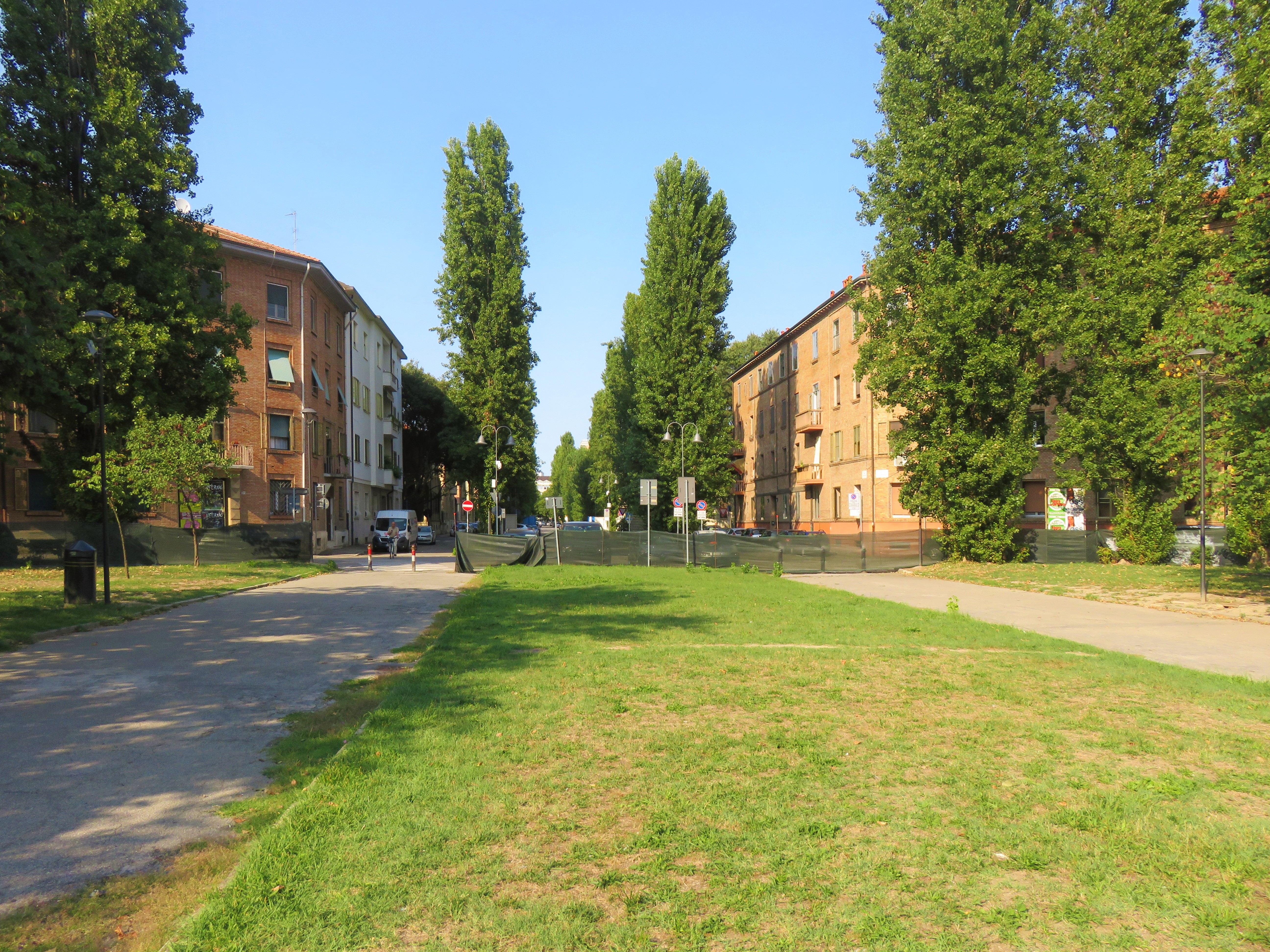 Corso Vittorio Veneto, a Ferrara, unisce viale Cavour con piazza XXIV Maggio. Questa è piazza XXIV Maggio.